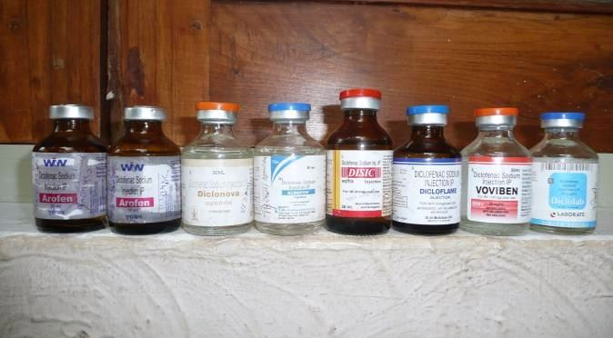 Diclofenac uttarakhand